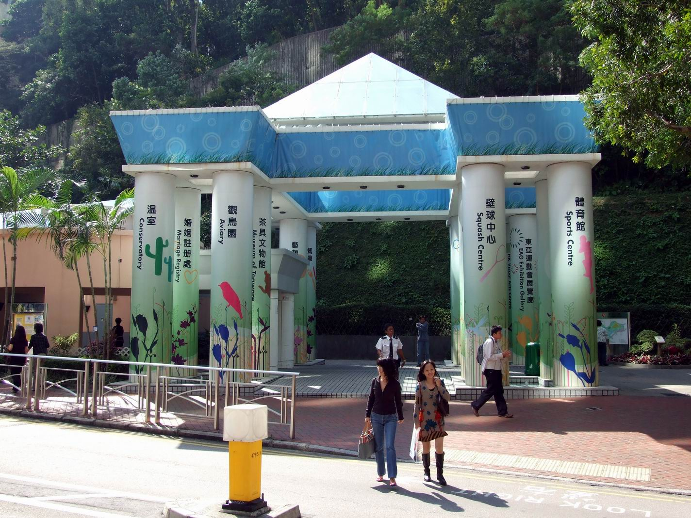 香港公園金鐘法院道入口